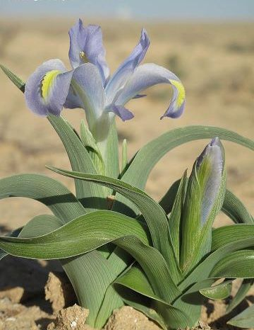 אירוס טוביה או "אירוס עוזיהו" המין אנדמי לאזור ארץ ישראל, צומח רק בהר הנגב המרכזי - בעיקר צפונית למכתש רמון ובהרי אדום.